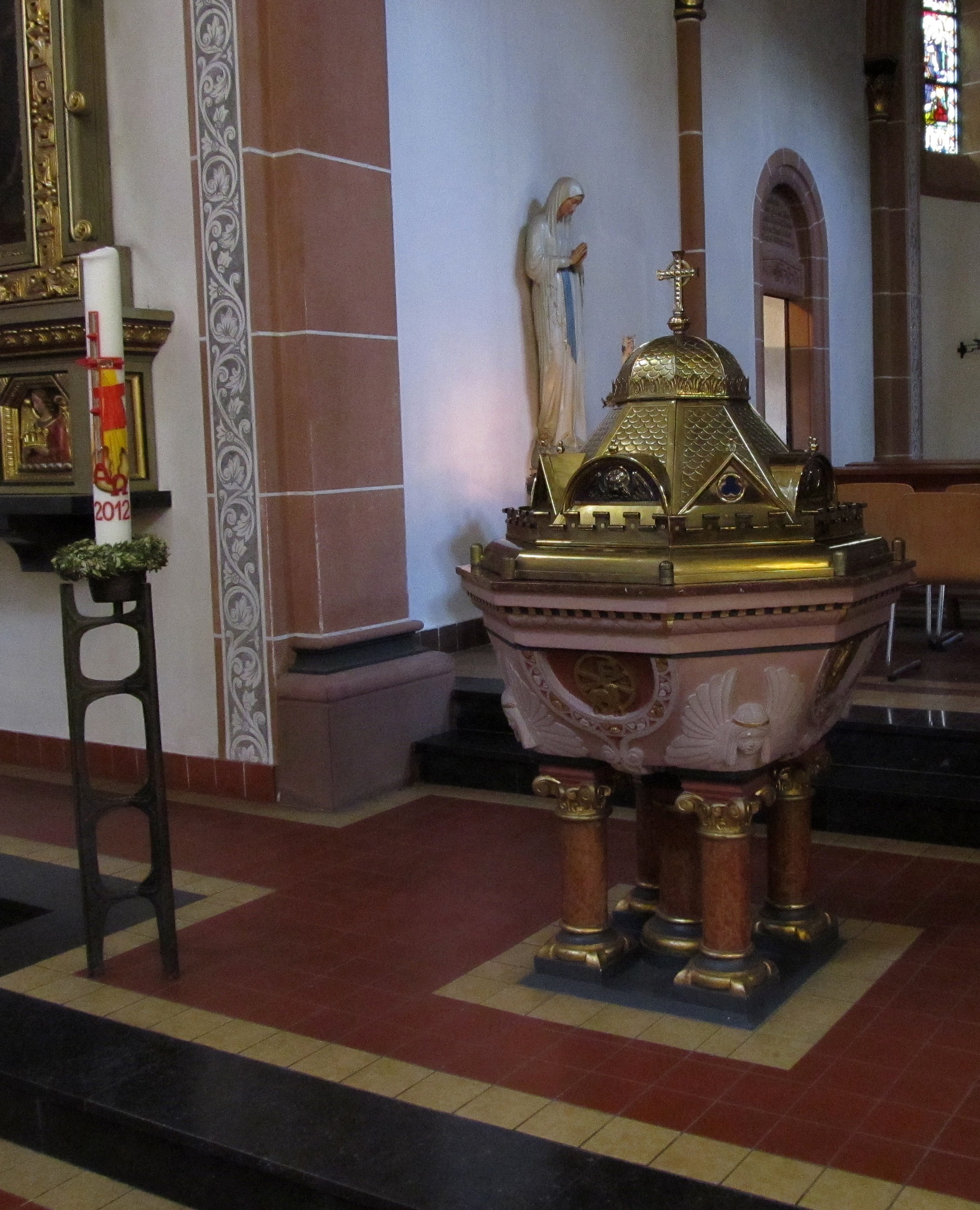 Taufbecken der katholischen Pfarrkirche St. Sebastian in Püttlingen, Saarland